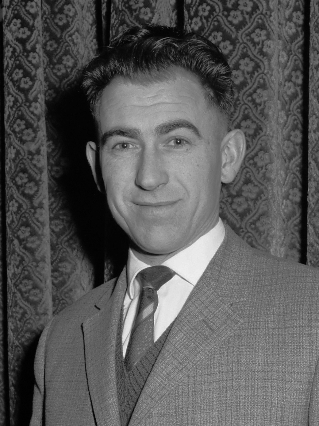 Uitreiking medailles voor de beste honkballers, Henk Keulemans 19 januari 1961